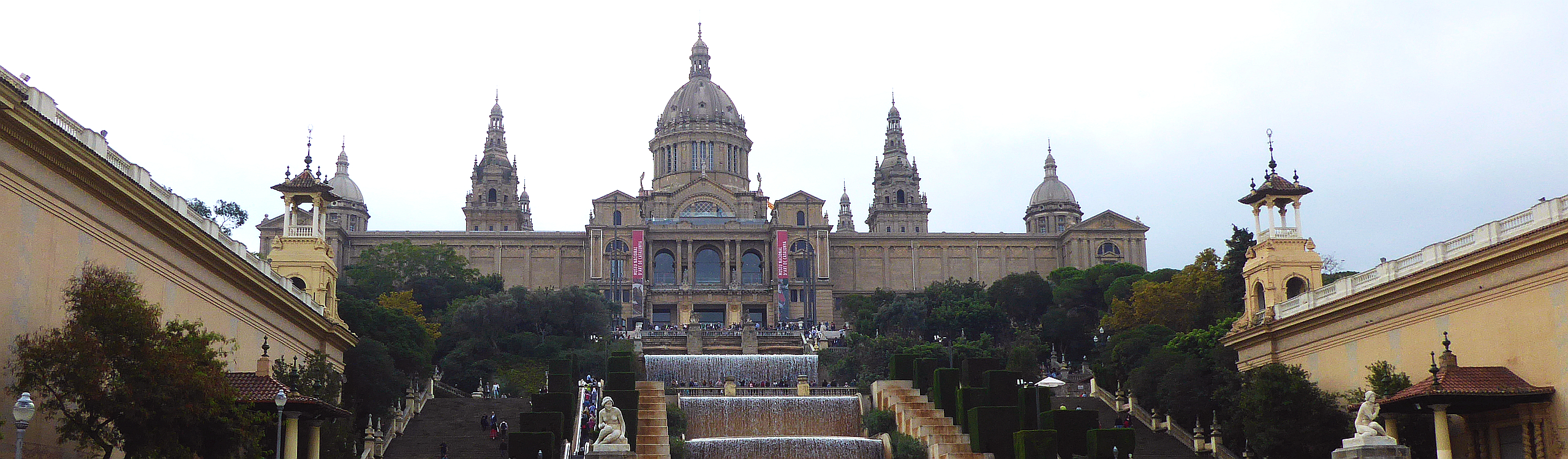 Palacios de Alfonso XIII y Victoria Eugenia (Palau) (erbaut bis 1923). Heute Paläste und Museum für moderne Kunst und Architektur in Barcelona, Spanien. Foto Wolfgang Pehlemann P1150984.jpg